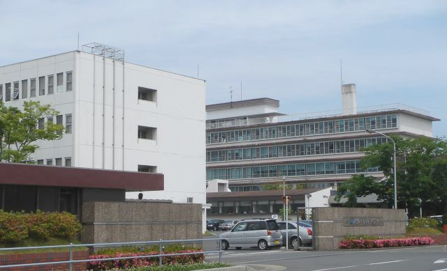 朝日大学正門前(岐阜県瑞穂市) 撮影：投稿者(Monami)、撮影日：2005年5月